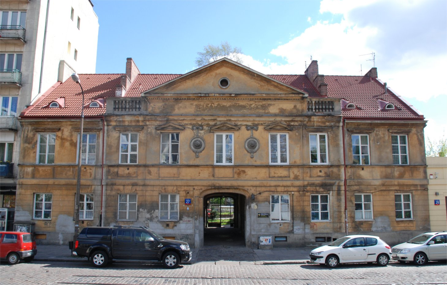 Kamienica Markowskiego przy Chłodnej 27 w Warszawie